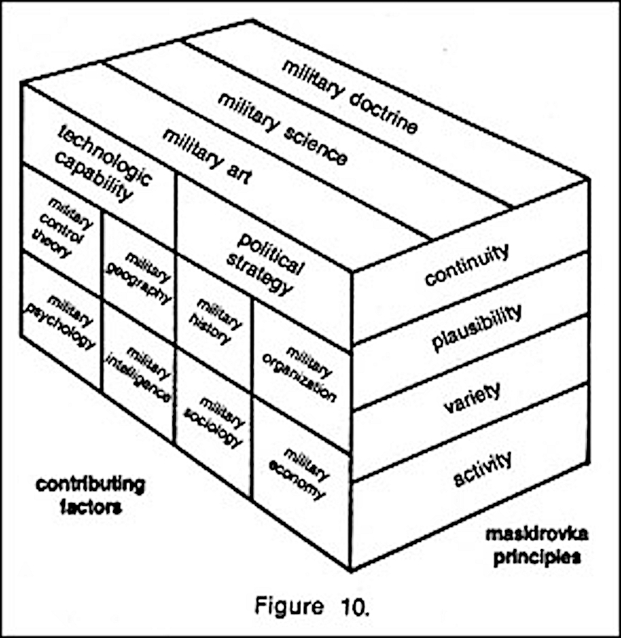 Maskirovka on multiple doctrinal levels